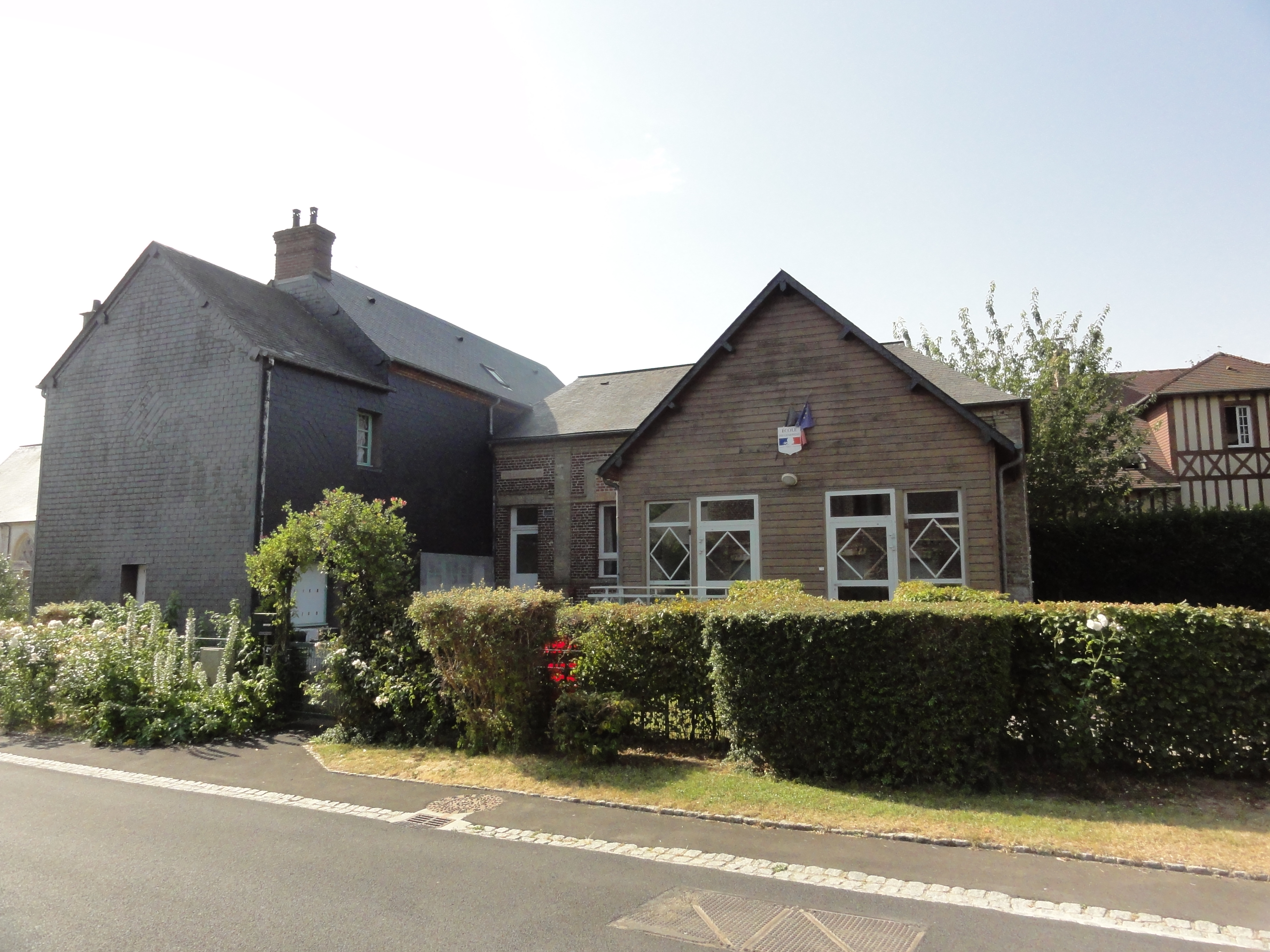 Auberville-la-Campagne (Seine-Mar.) école des Charmilles